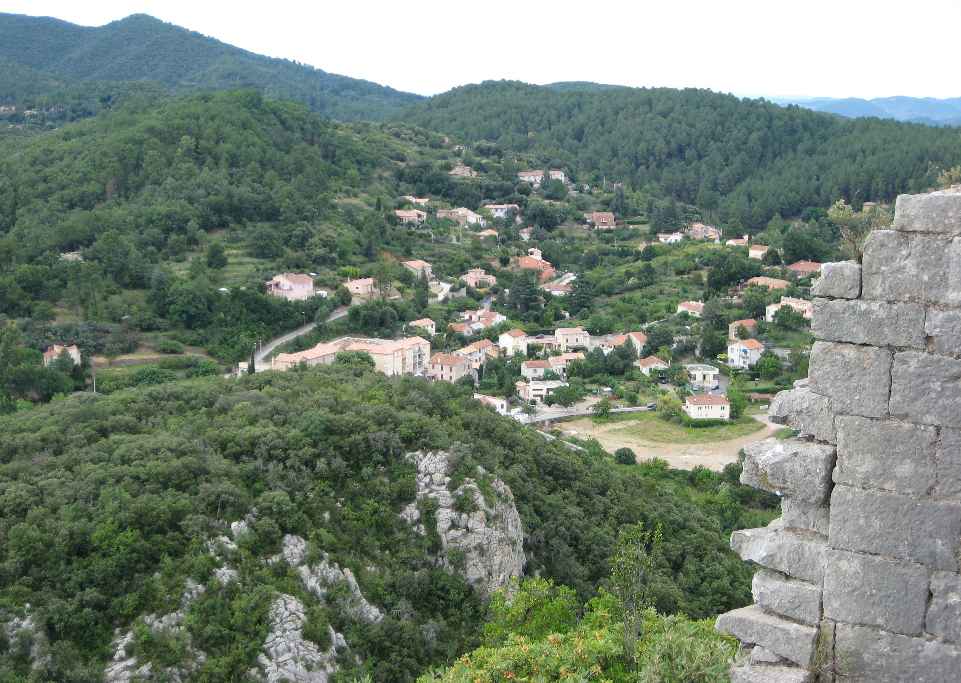 Village de Saint-Jean-du-Pin pris en photo depuis les ruines du Castellas à 285m d'altitude.